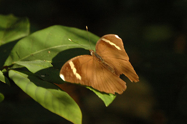 Uganda Kanyo Pabidi Res, Masindi, Uganda